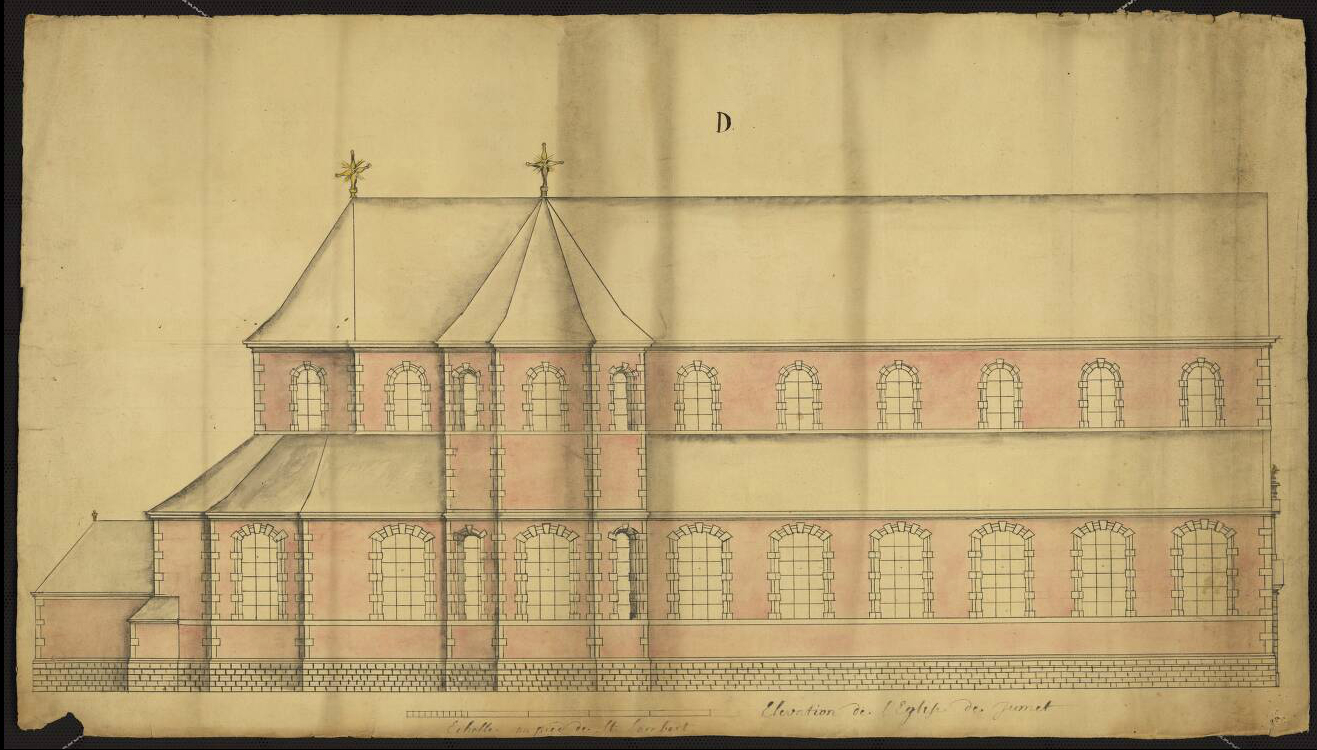 Jumet - Église Saint-Sulpice - Plan, coupes transversale et verticale, et élévation des façades principale et latérale - feuille D